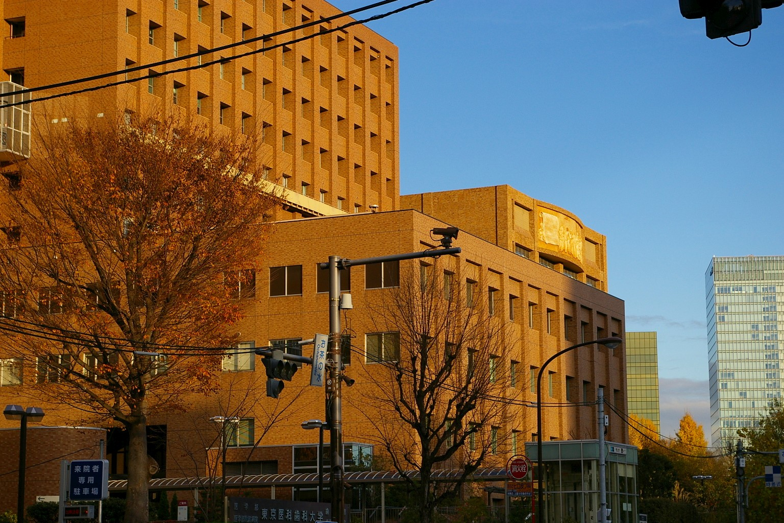 Tokyo Medical and Dental University